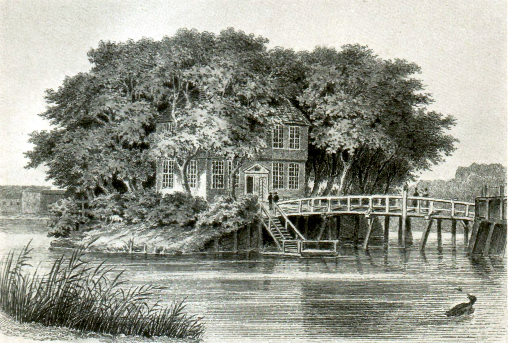 Herrenhaus in Wohldorf, Lithografie von W. Heuer nach einem Aquarell von Otto Speckter.